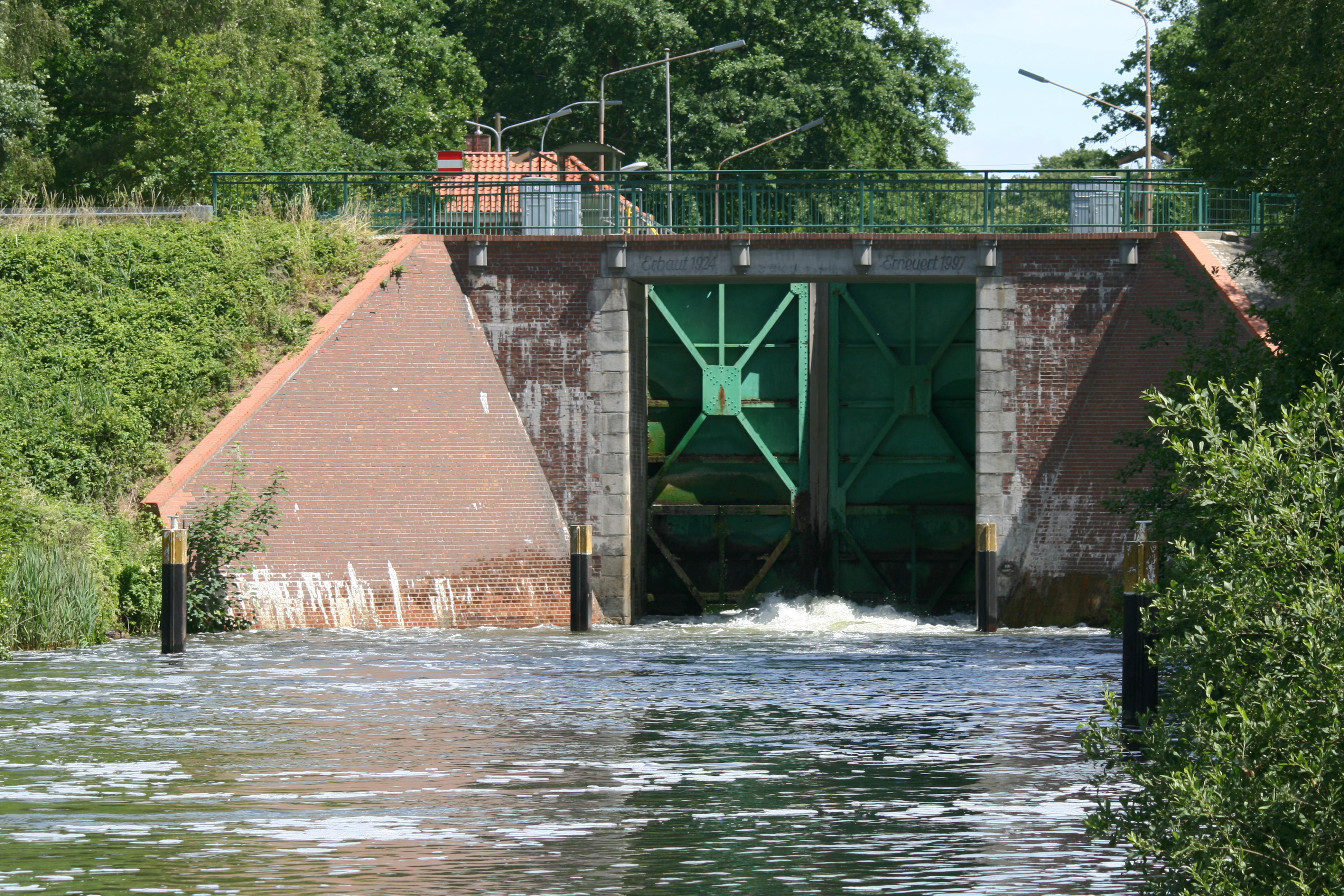 Schleuse an der Müritz-Elde-Wasserstraße bei Bobzin, einem Ortsteil von Lübz, Mecklenburg-Vorpommern